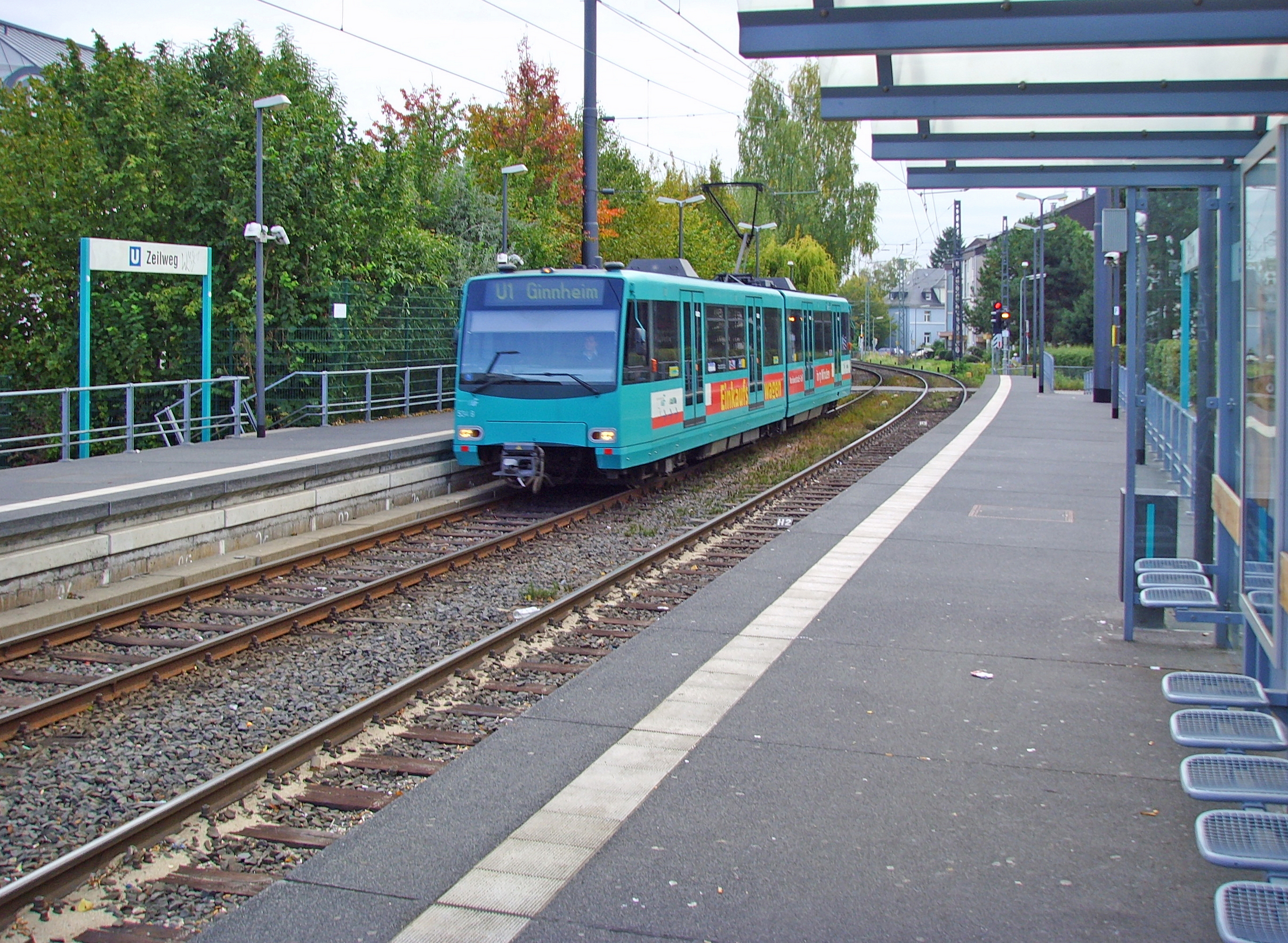 Frankfurt am Main-Heddernheim: U-Bahnhof Zeilweg